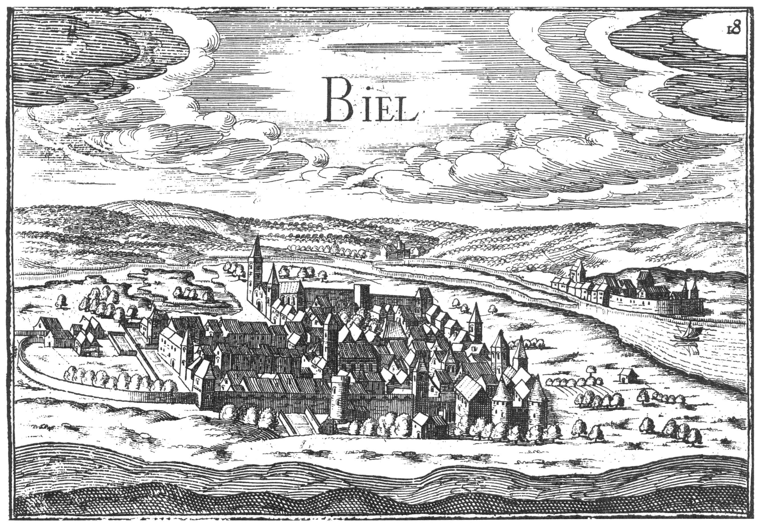 Biel um 1546. Stich von N. Tassin (1635) nach dem Stich von H. Vogtherr